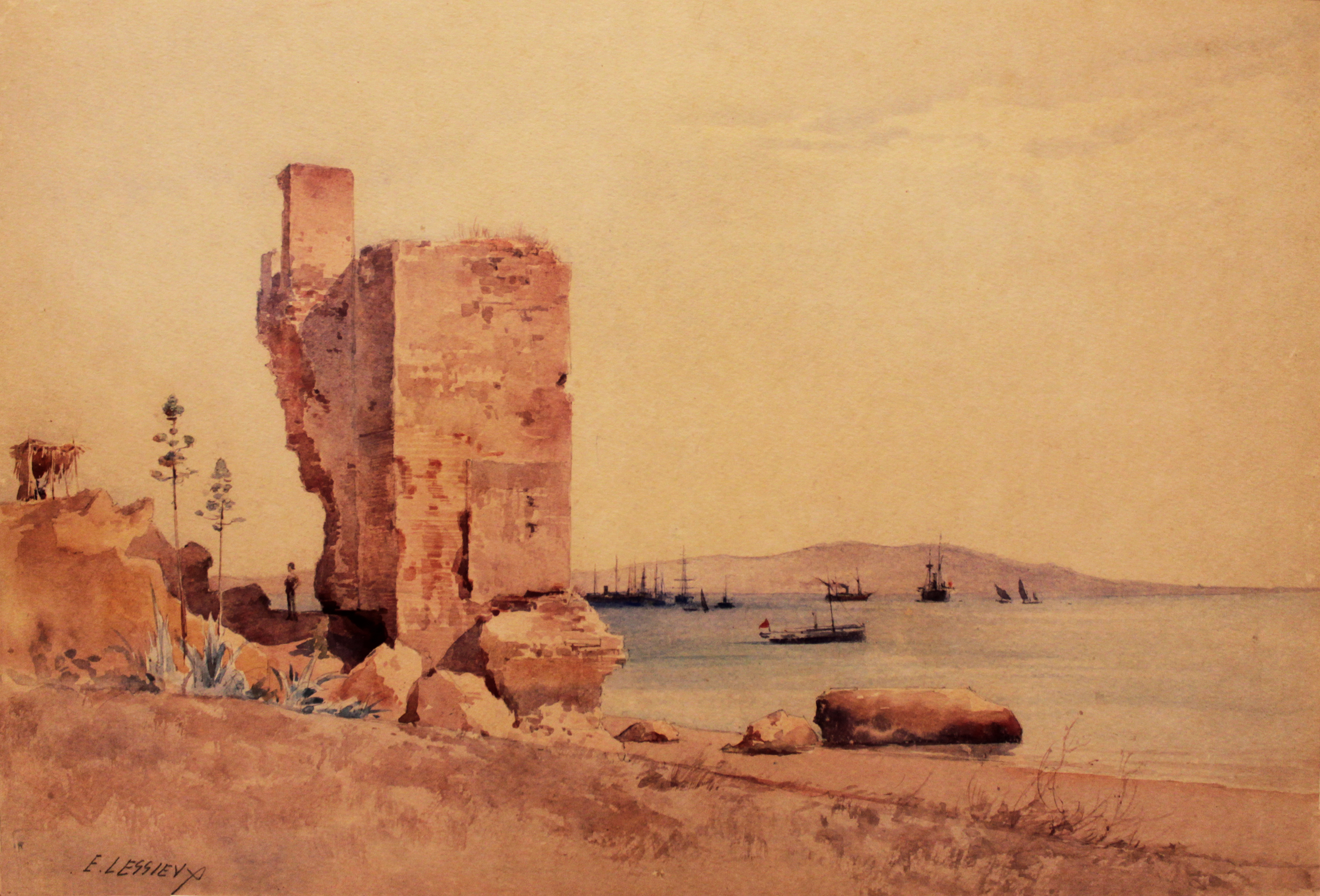 Ruine à Algesiras, acuarela del siglo XIX de Ernest Louis Lessiuex que representa la antigua torre albarrana denominada Torre de Don Rodrigo situada en la playa de El Chorruelo de Algeciras. Museo municipal de Algeciras, Andalucía, España.